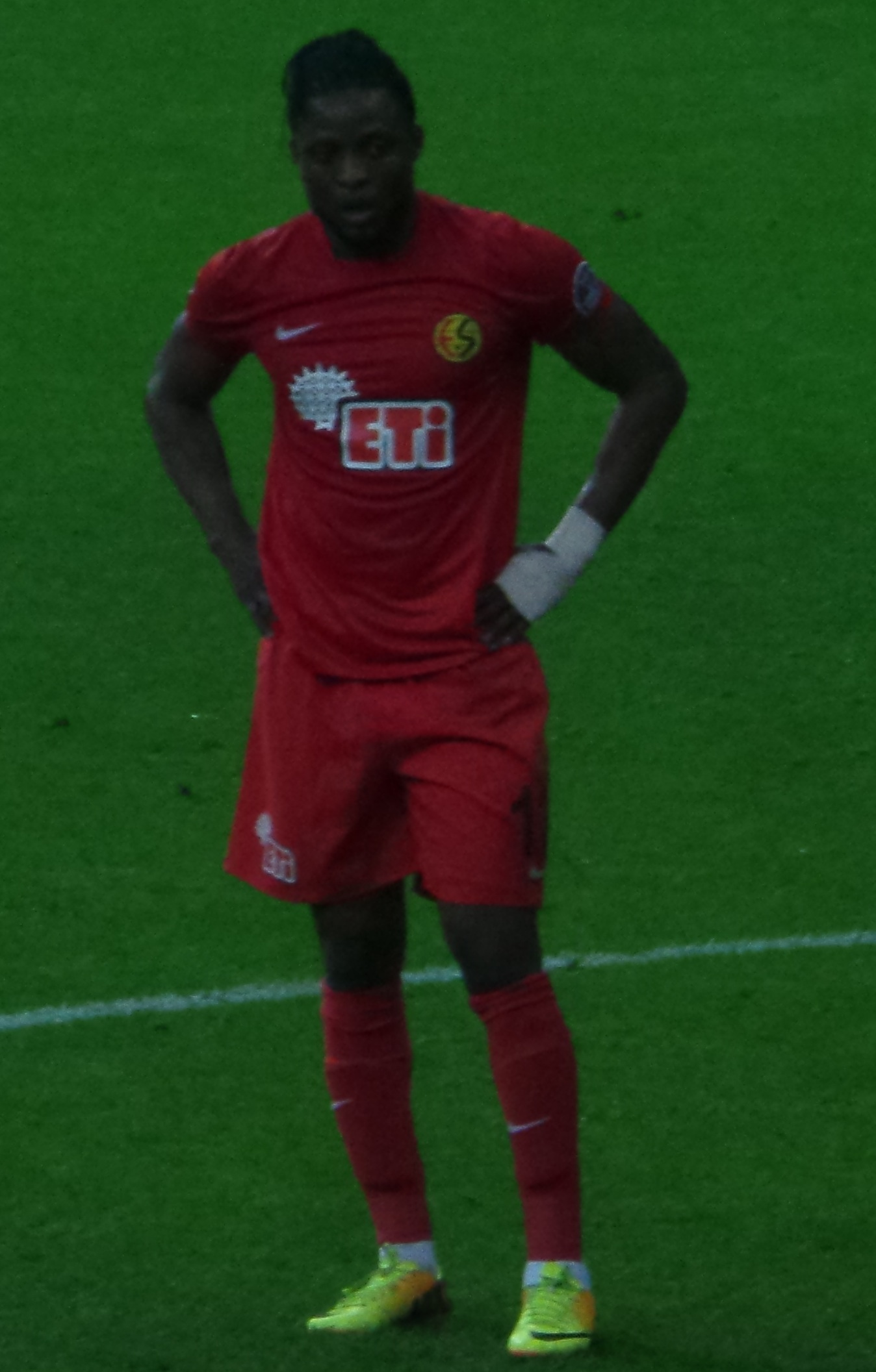 Lawal against G.S.